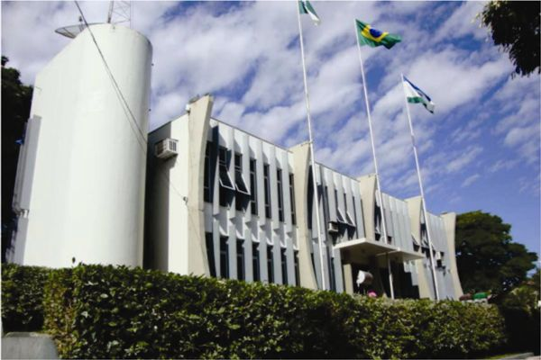 Paço Municipal de São Jorge do Patrocínio